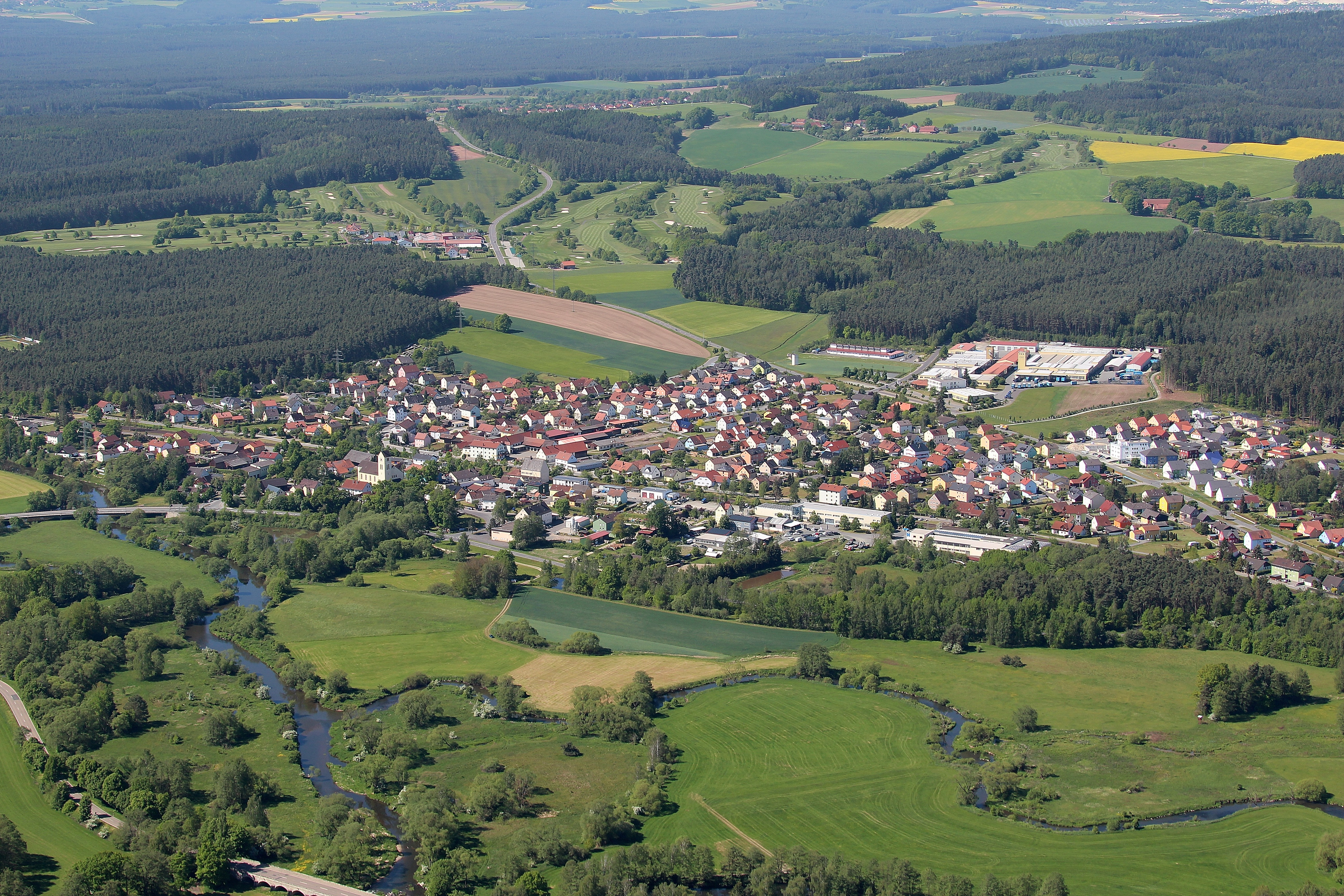 Die Haidenaab (von rechts kommend) mündet in die Waldnaab. Die beiden Flüsse vereinigen sich zur Naab. In der Mitte des Bildes Oberwildenau; Landkreis Neustadt an der Waldnaab, Oberpfalz, Bayern